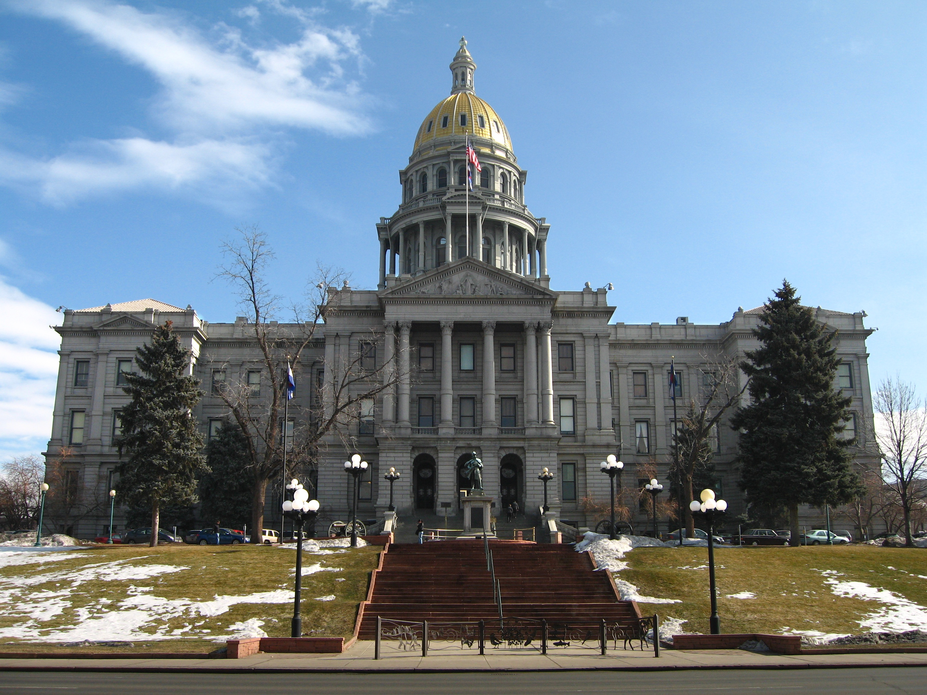 Colorado State Capitol Building, Denver, Colorado, USA